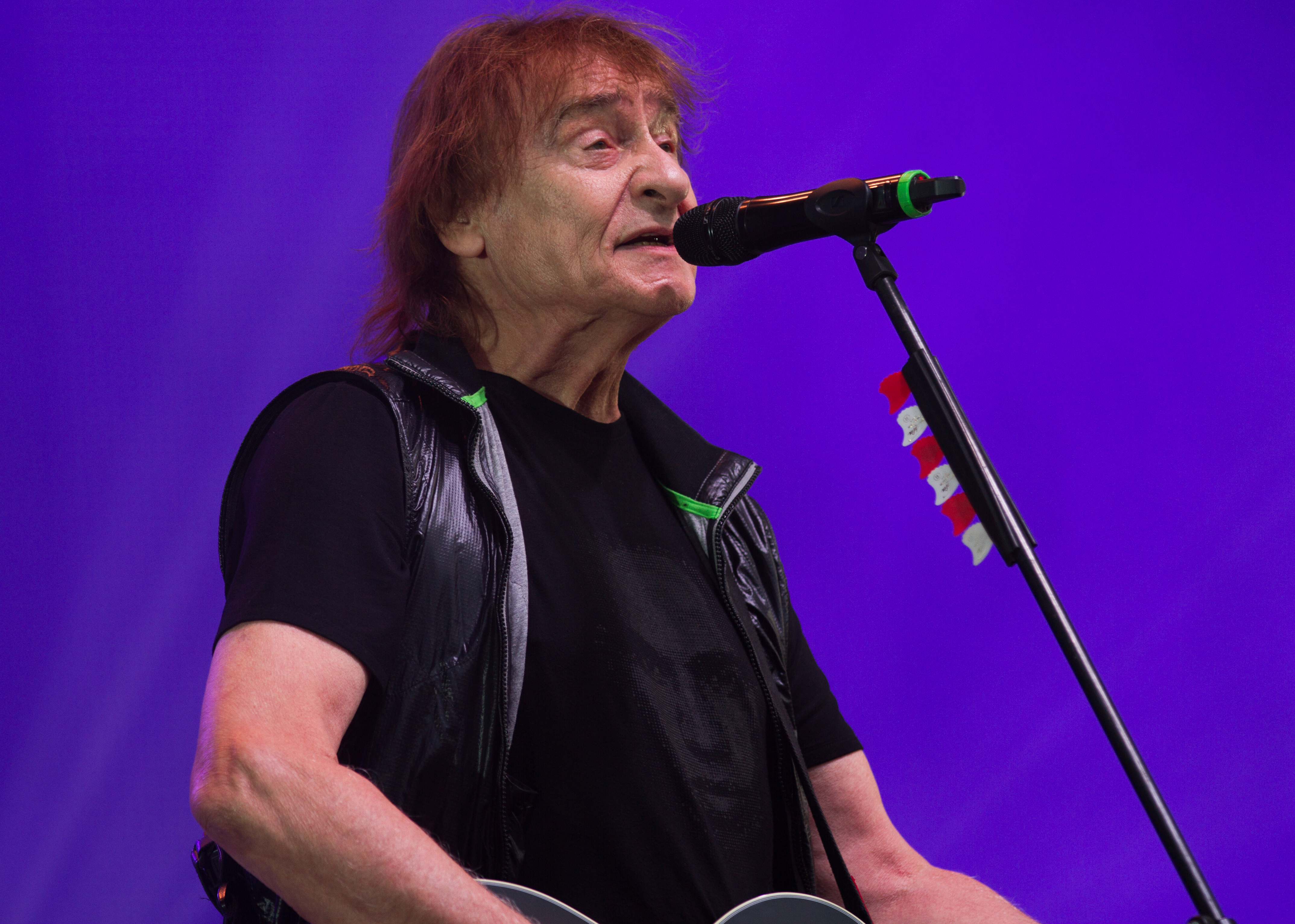 Dieter „Maschine“ Birr beim "Puhdys - Das große Abschiedskonzert 2015" in der Kindl-Bühne Wuhlheide